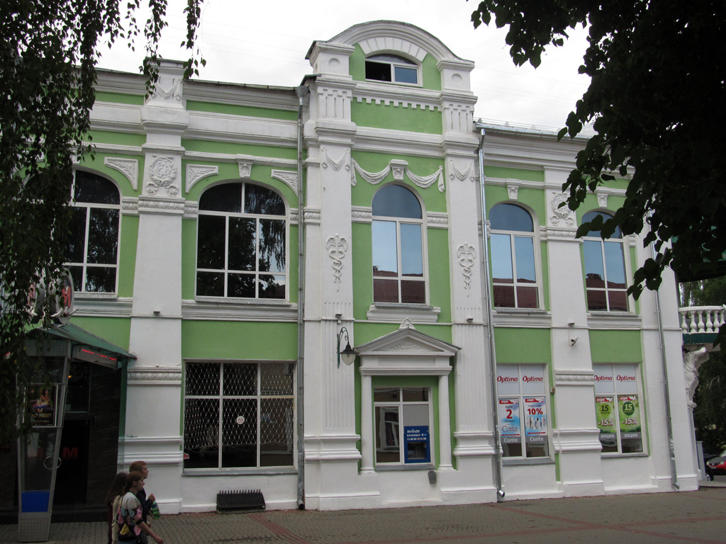 Магілёў. Вуліца Ленінская, 36 / Мігая, 13